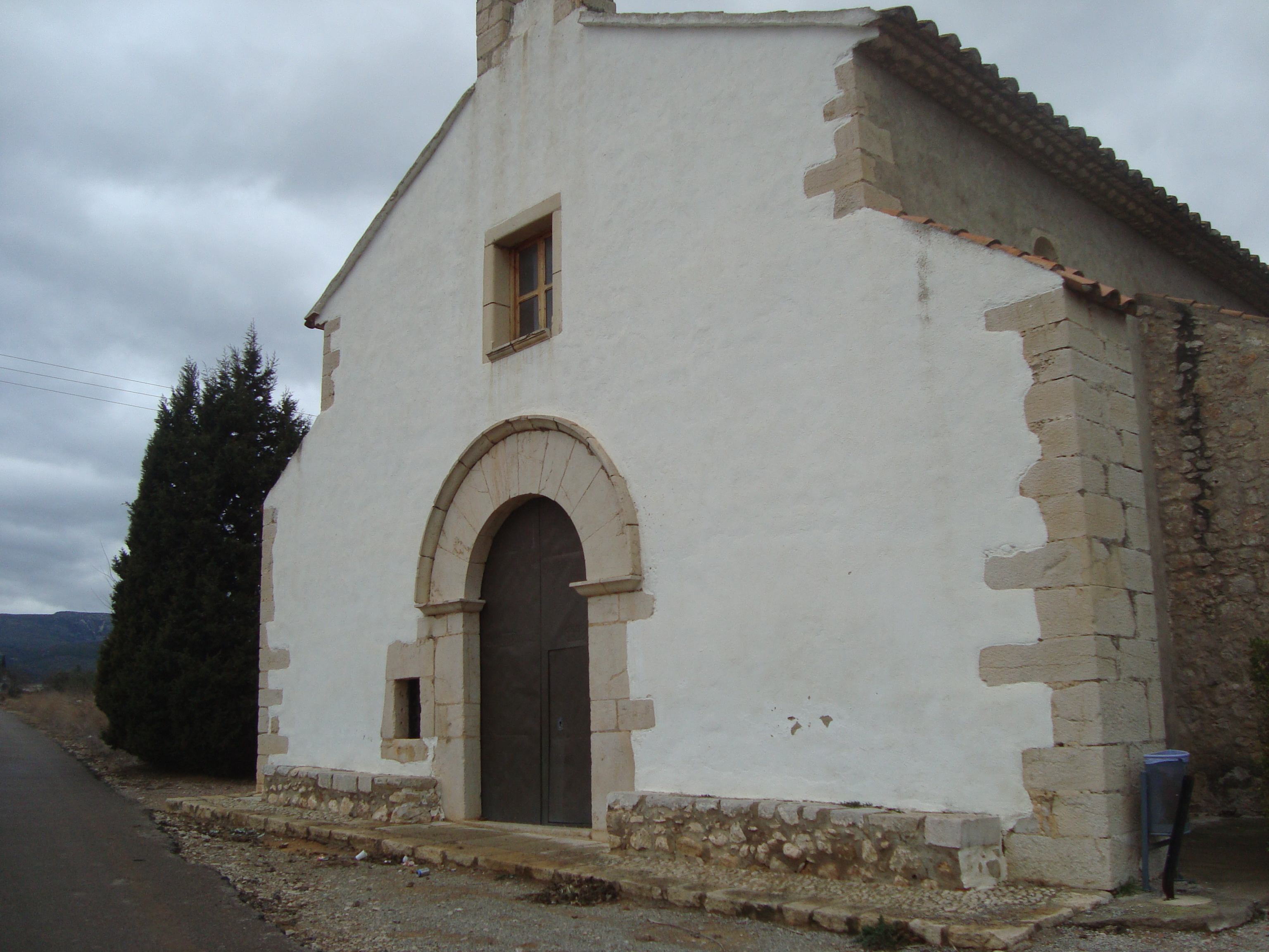 Ermita de San Vicente Ferrer de les Coves de Vinromà, Castelló